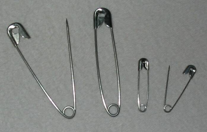 Sicherheitsnadeln, selbst fotografiert